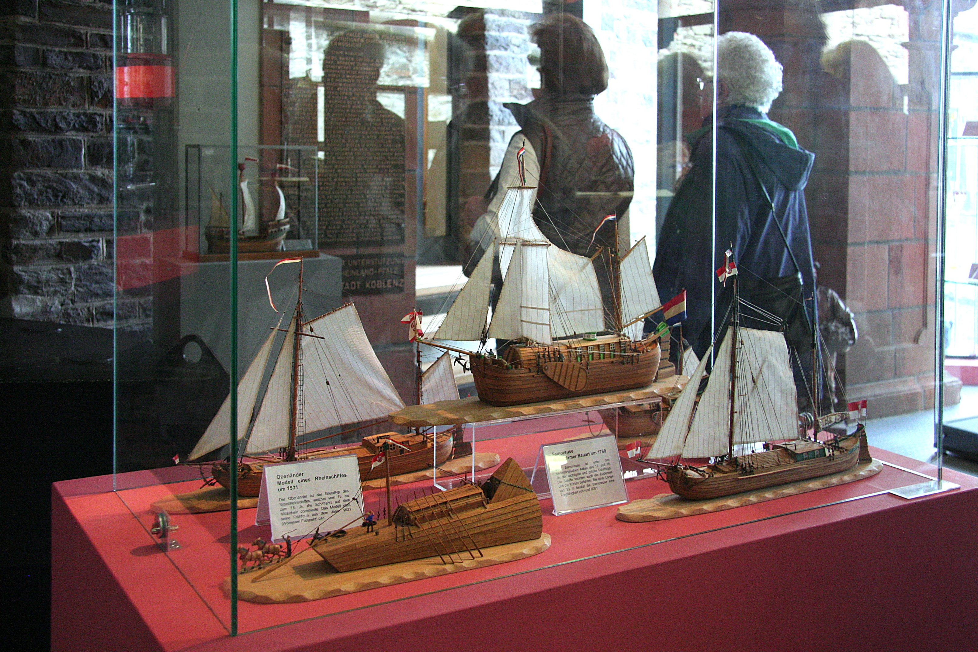 Modelle früher Rheinschiffe im Rheinmuseum Koblenz